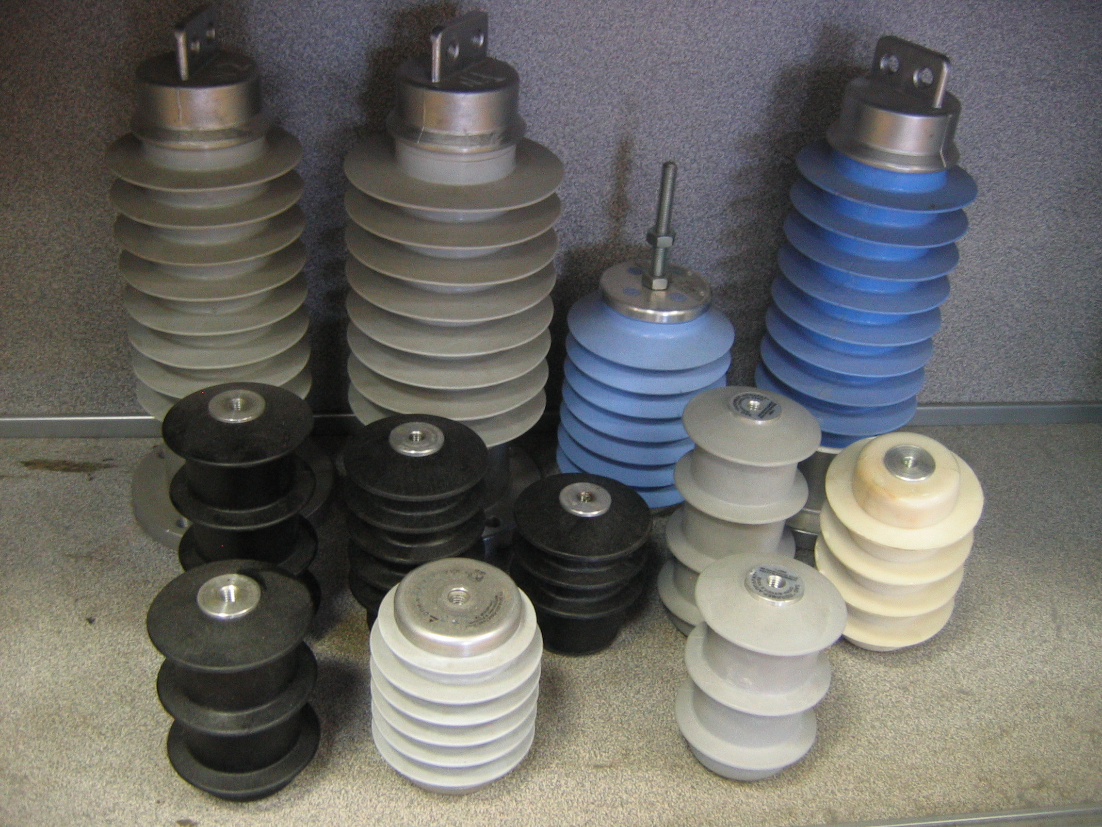 различные ОПН